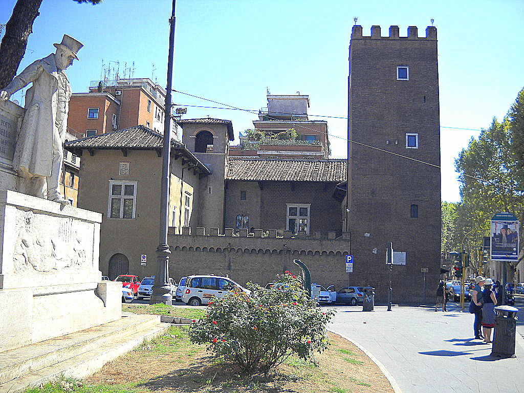 Palazzo Anguillara (c.d. "Casa di Dante") e Monumento a Gioacchino Belli in Trastevere, Roma